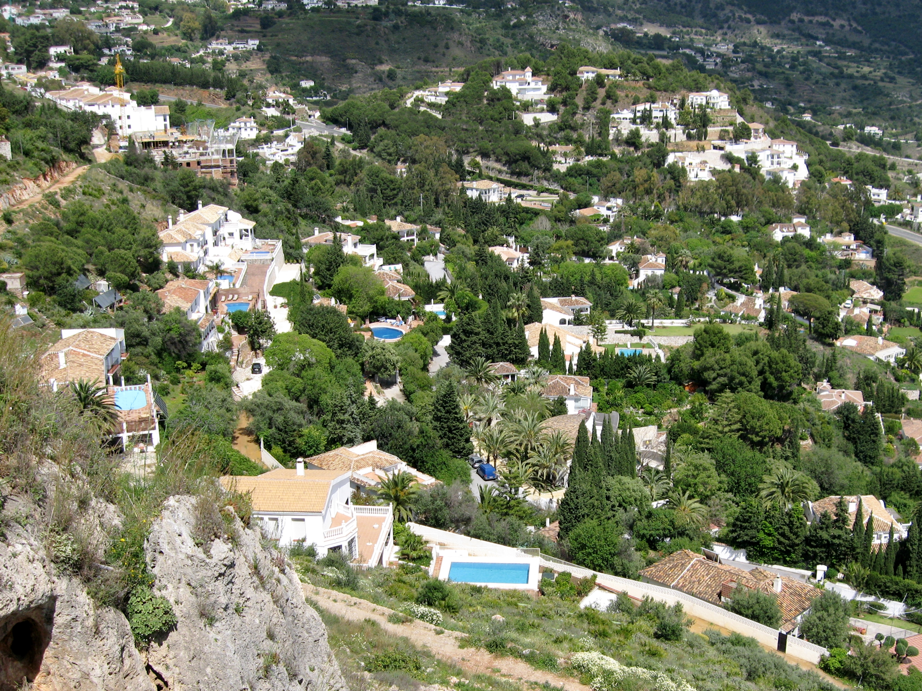 Urbanisation Santa Rosa, Mijas, Provinz Málaga, Andalusien, Spanien